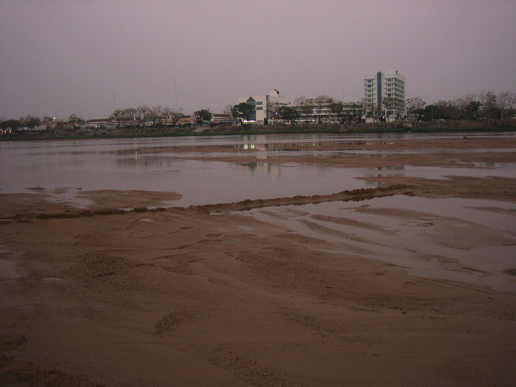 Blick auf Tak über den flachen Ping River hinweg